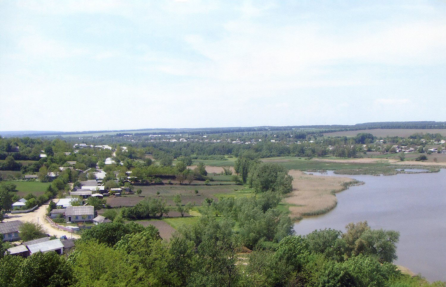 Панорама села Цибулівки